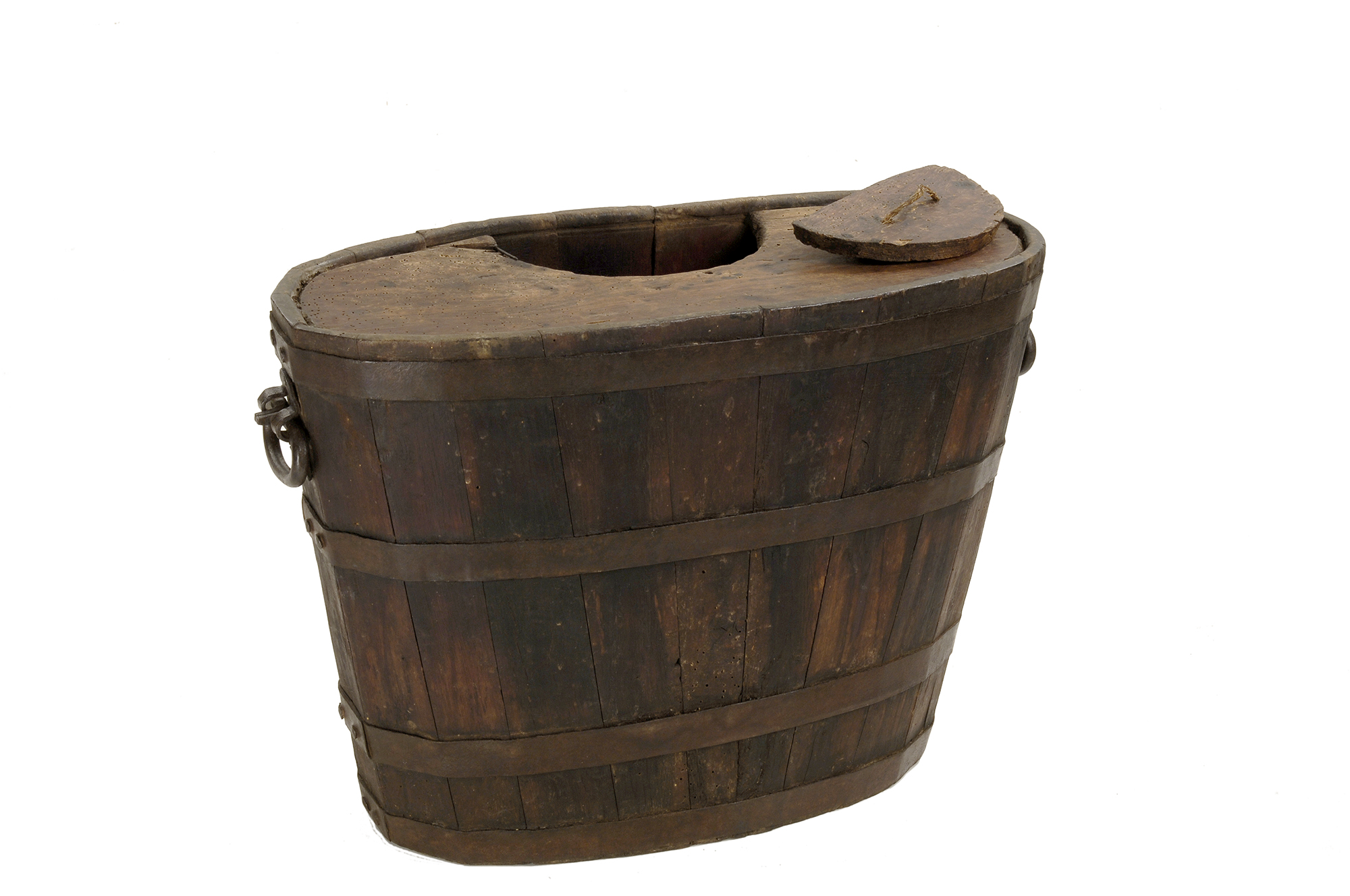 Fotografies dels objectes de l'exposició permanent de la sala "Secà i Muntanya" del Museu Valencià d'Etnologia - Fotografies de Mateo Gamon. Portadora de raïm. València, segle XX.